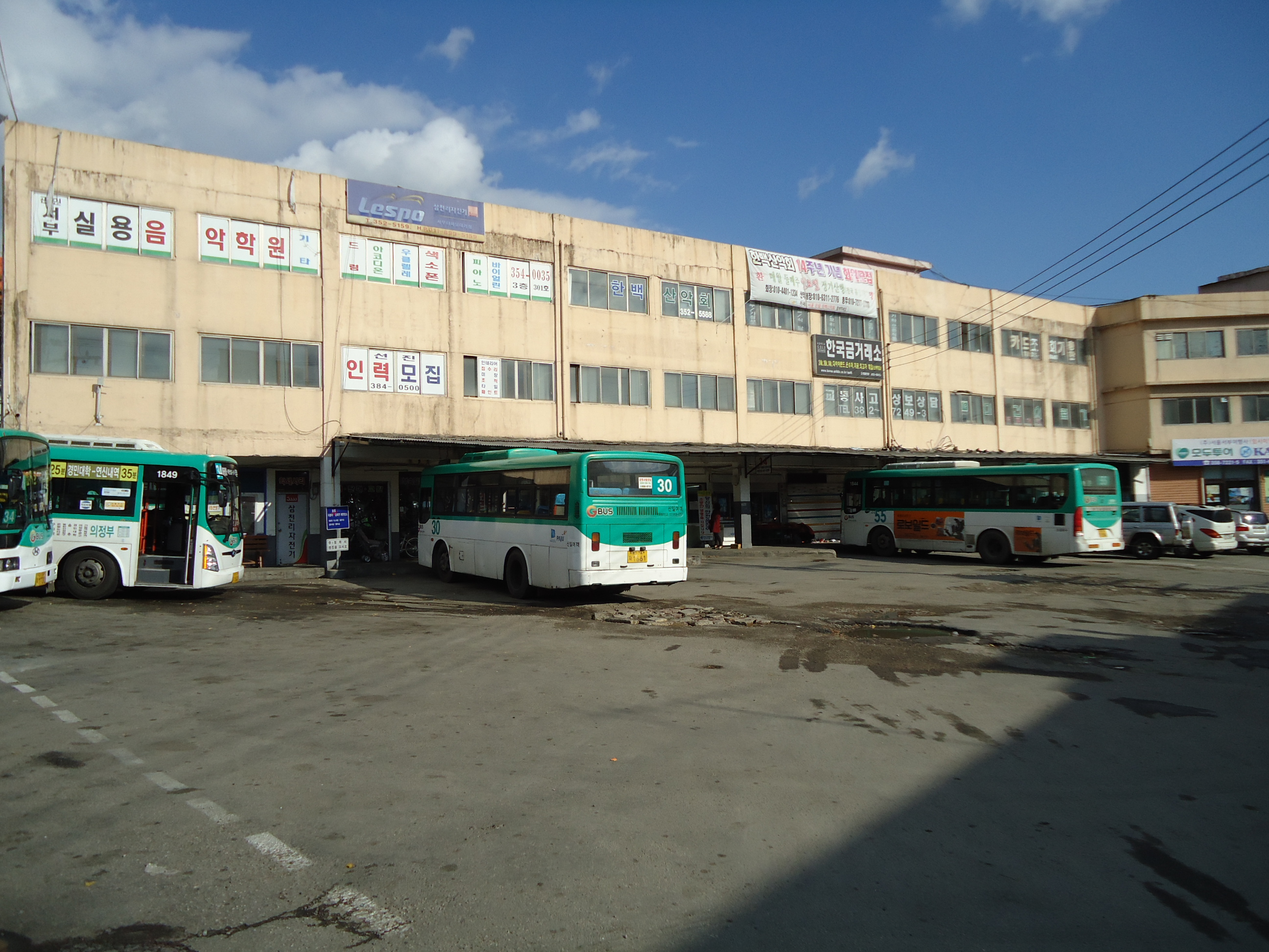 서울특별시 은평구 불광동에 위치한 서울 서부시외버스터미널입니다.